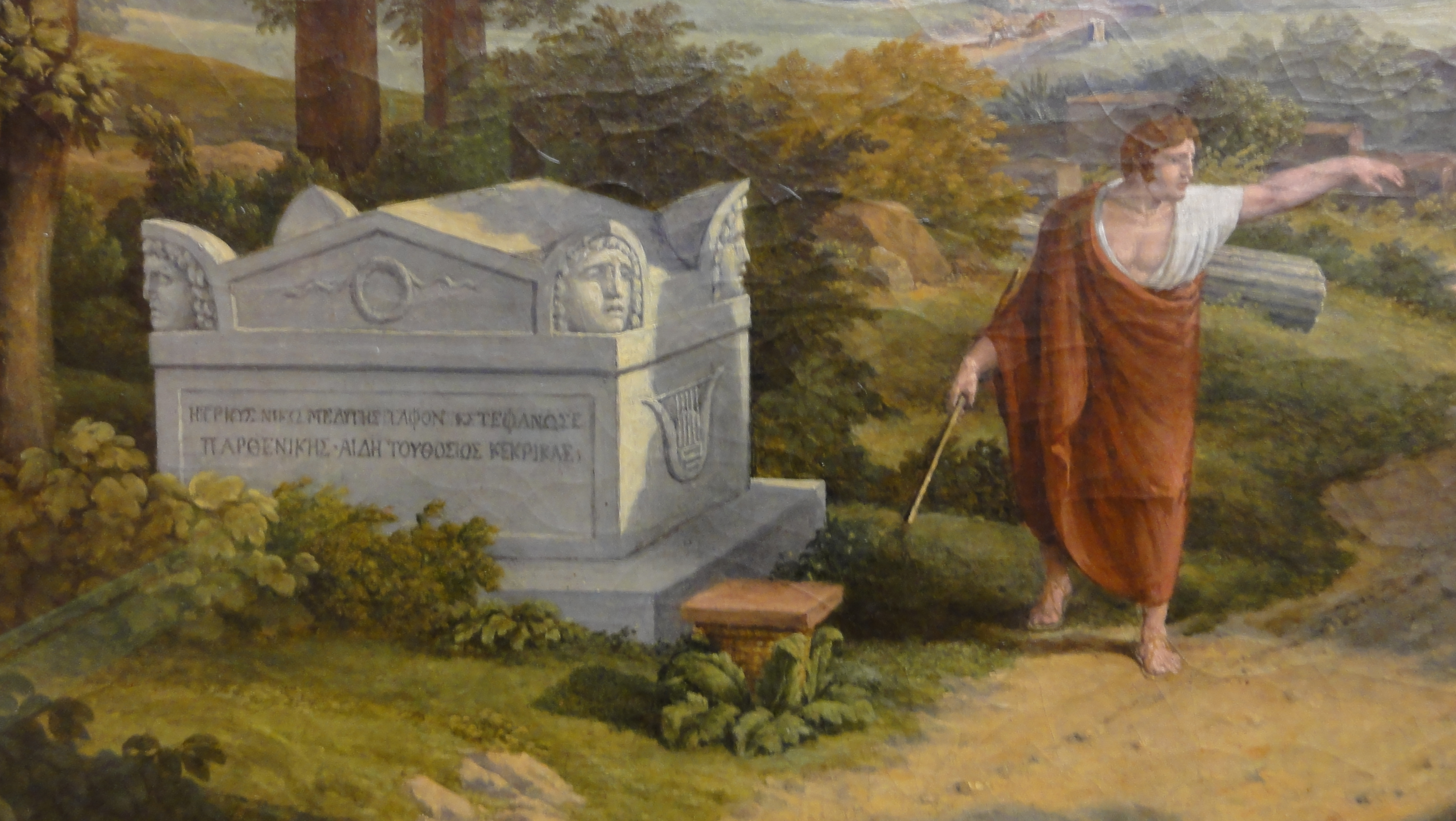 detail left